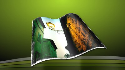 Qt5_shadereffect